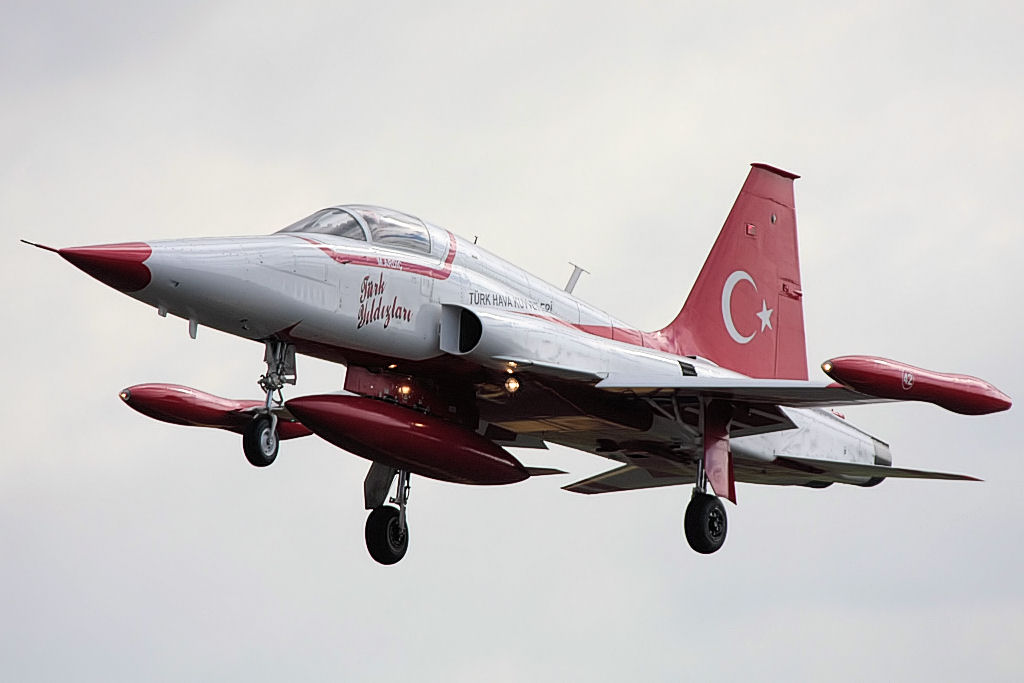 F5 - RIAT 2008